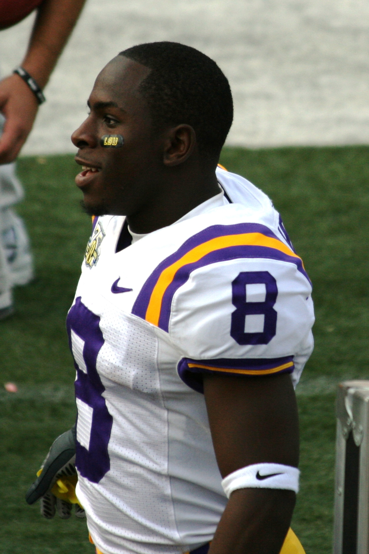 Trindon Holliday